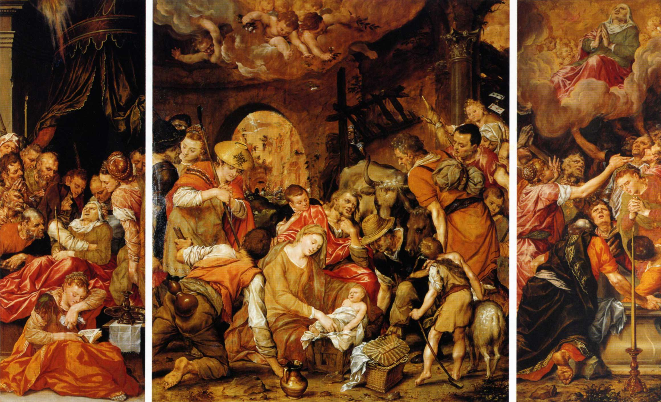 Drieluik met het leven van Maria (altaarstuk Sint Janskerk Gouda)